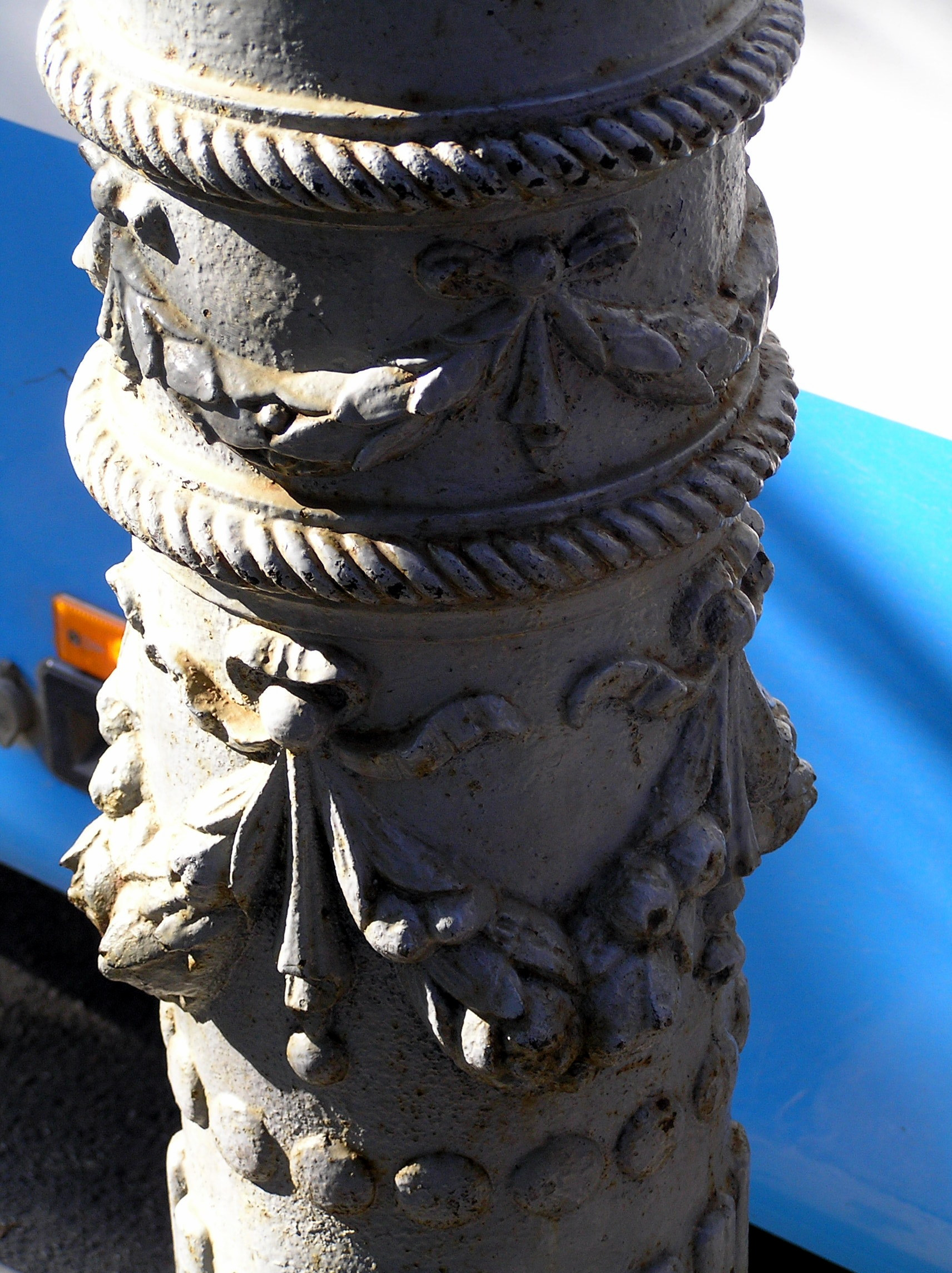 particolare del lampione superstite diquelli che illuminavano il capolinea degli autobus extraurbani di Piazza Cavour di Ancona